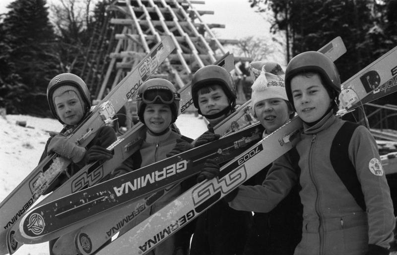 Oberhof, junge Winteersportler ADN-ZB/Schaar/19.1.83/ Bez. Suhl: Der wenige Schnee läßt die gute Stimmung nicht sinken. Recht zuversichtlich blicken diese 12-jährigen Nordisch-Kombinierten aus dem Bezirk Suhl in die Kamera. Auf der Oberhofer Pionierschanze bereiten sie sich auf die Wettkämpfe der IX. Kinder- und Jugendspartakiade der DDR in Oberwiesenthal vor. Beim Präparieren der Schanze halfen sie fleißig mit.